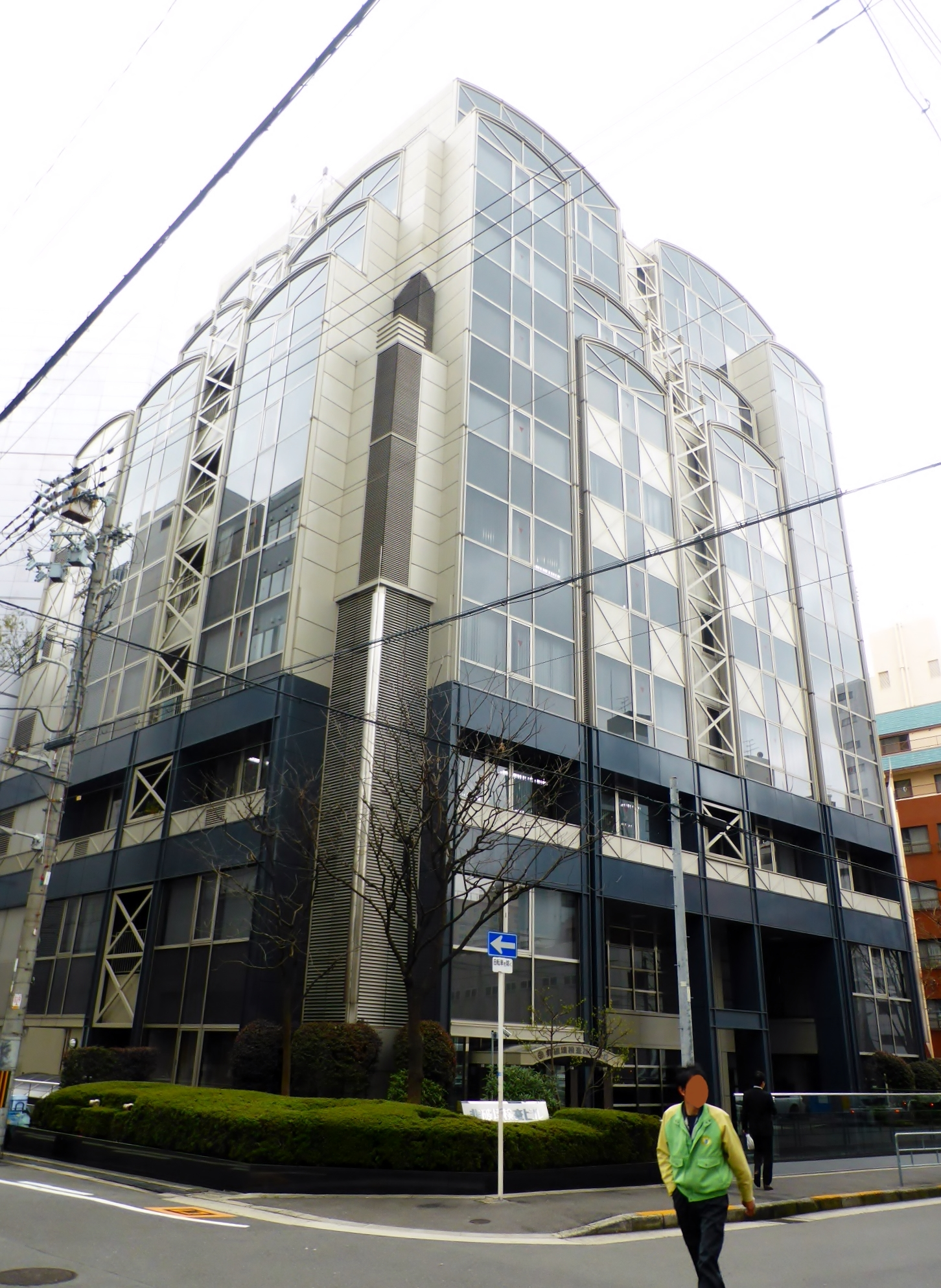 非破壊検査株式会社本社を撮影